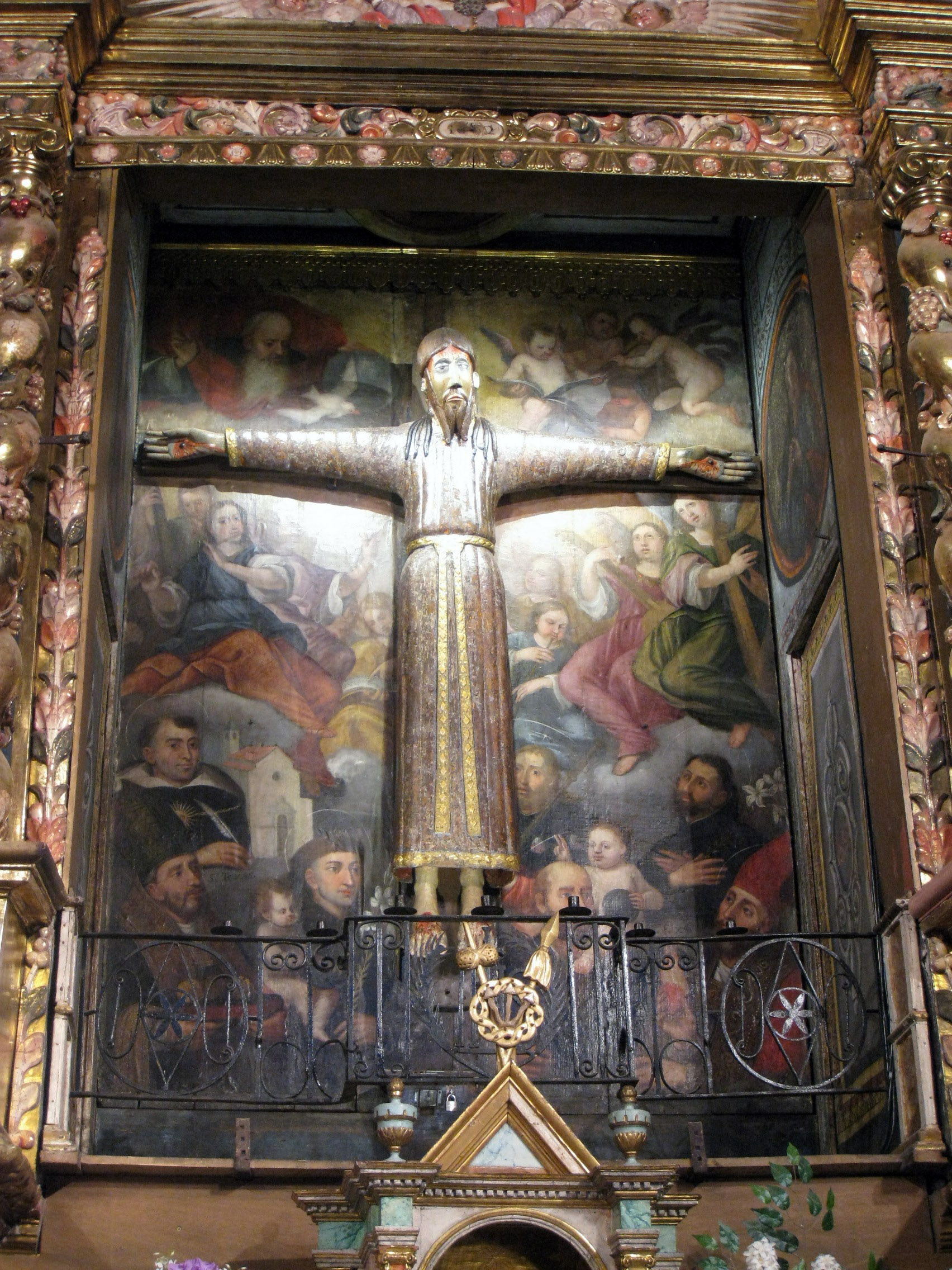 Església de Sant Cristòfol de Beget (Camprodon)